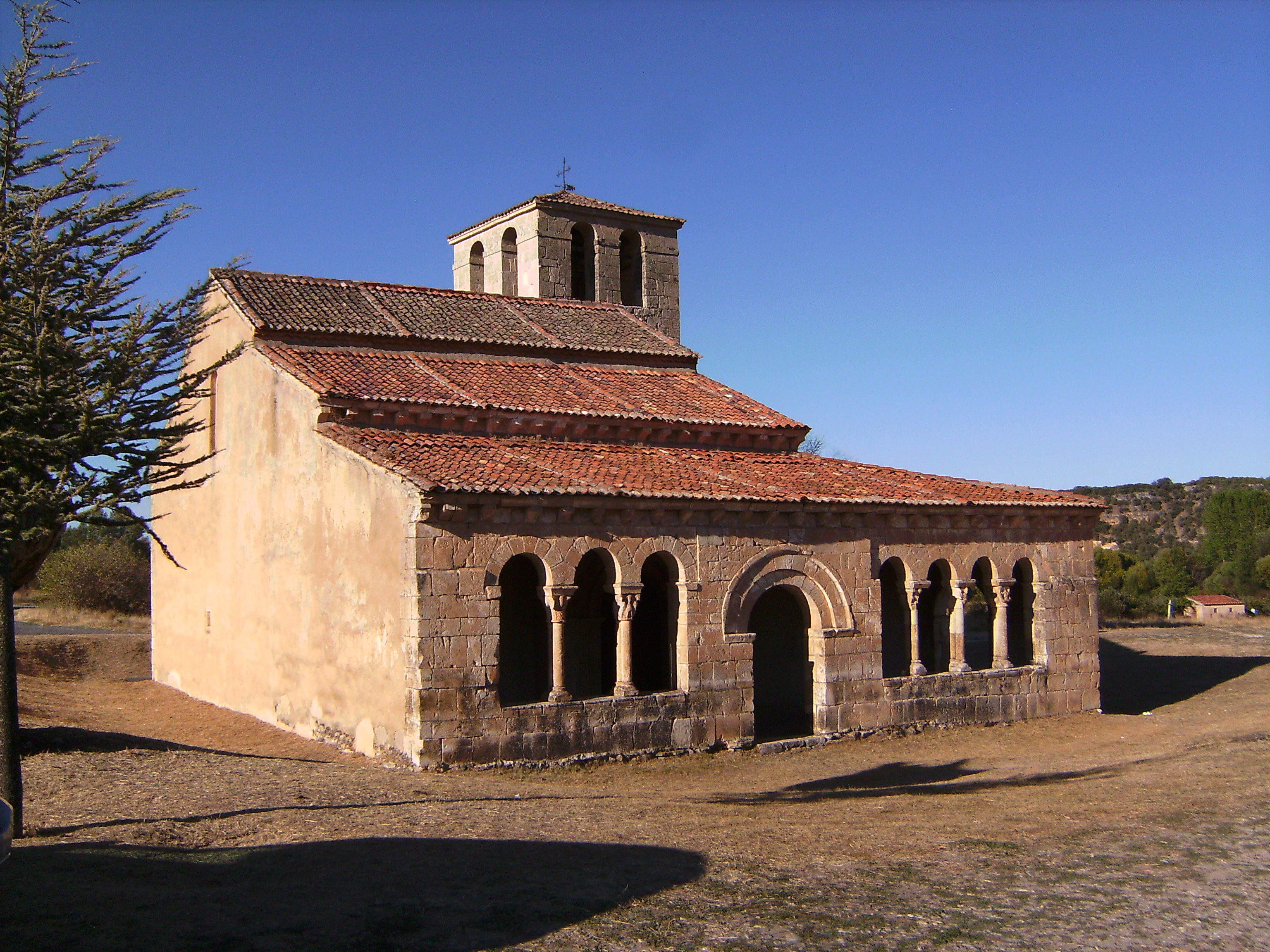 Requijada - Iglesia de Nuestra Señora de las Vegas (Exterior)